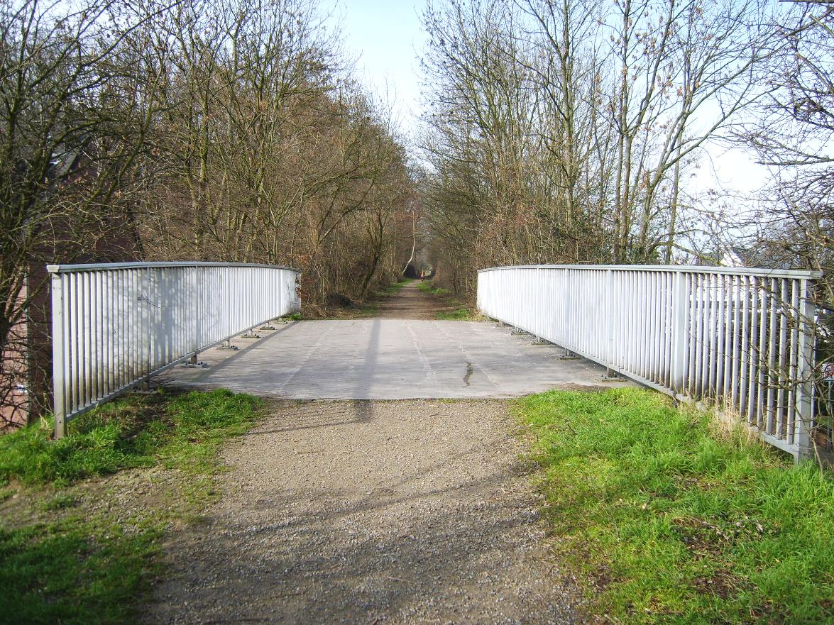 Ehemalige Trasse der Bahnstrecke Aachen-Nord–Jülich, welche über einer Brücke die Pützdrieschstraße exakt zwischen den Alsdorfer Stadtteilen Hoengen und Mariadorf überquert